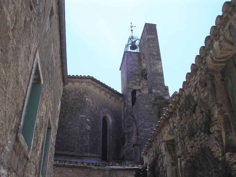 Prades-le-Lez (Hérault) - Vue du clocher de l'église Saint-Jacques-le-Majeur depuis le Vieux Prades